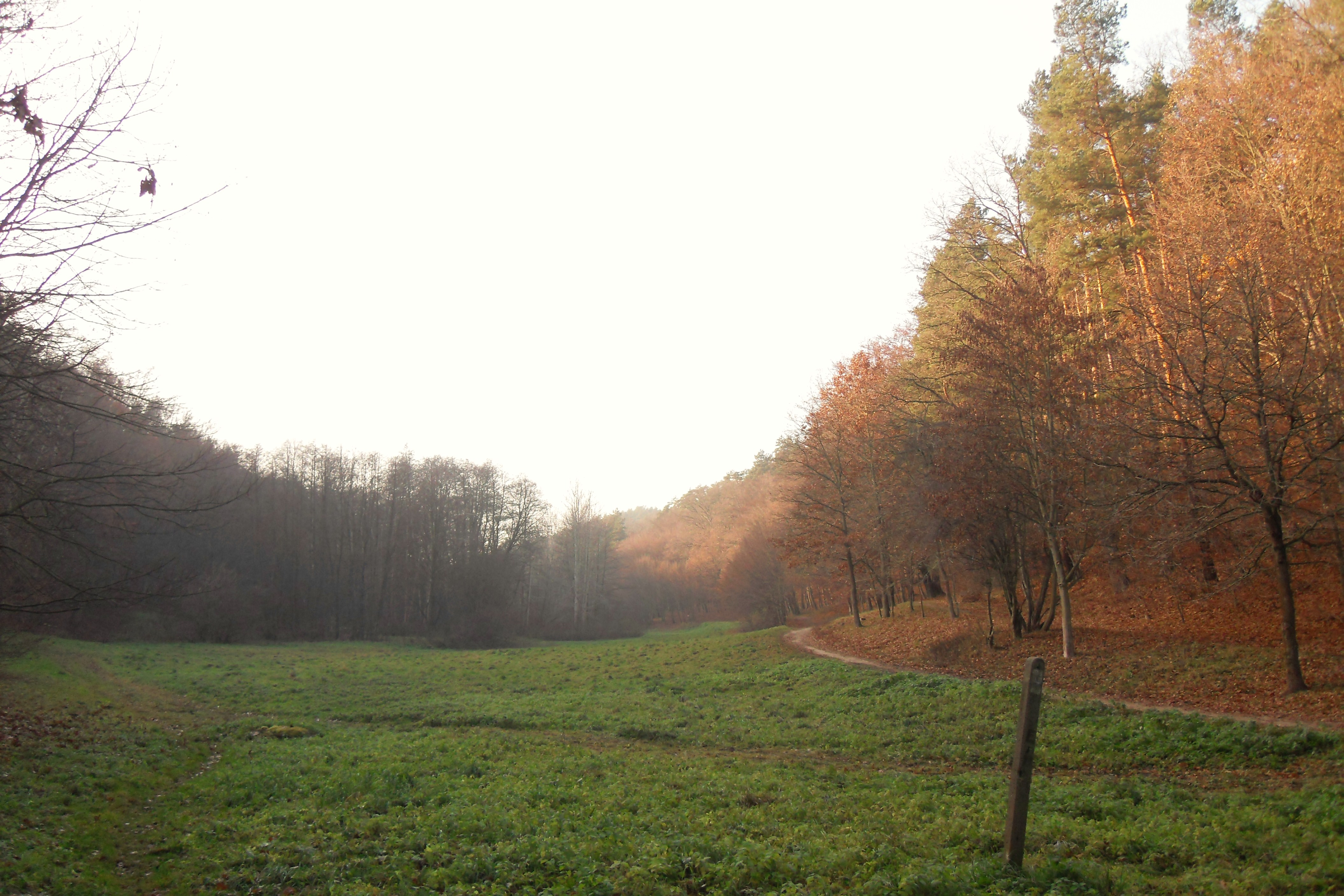 Gdańsk VII Dwór. Dolina Samborowo.